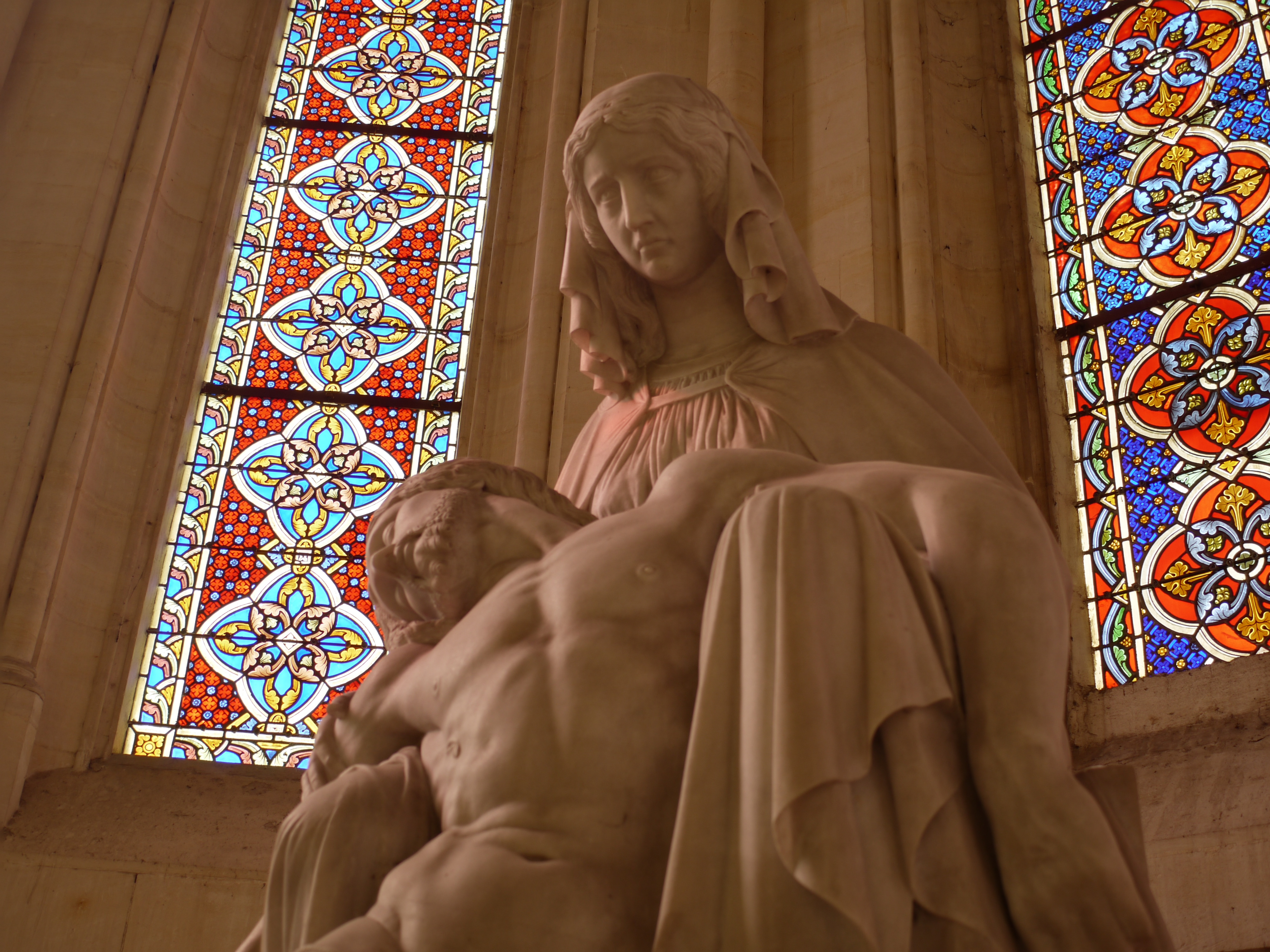 La Vierge et le Christ, Eglise Saint Charles Borromée